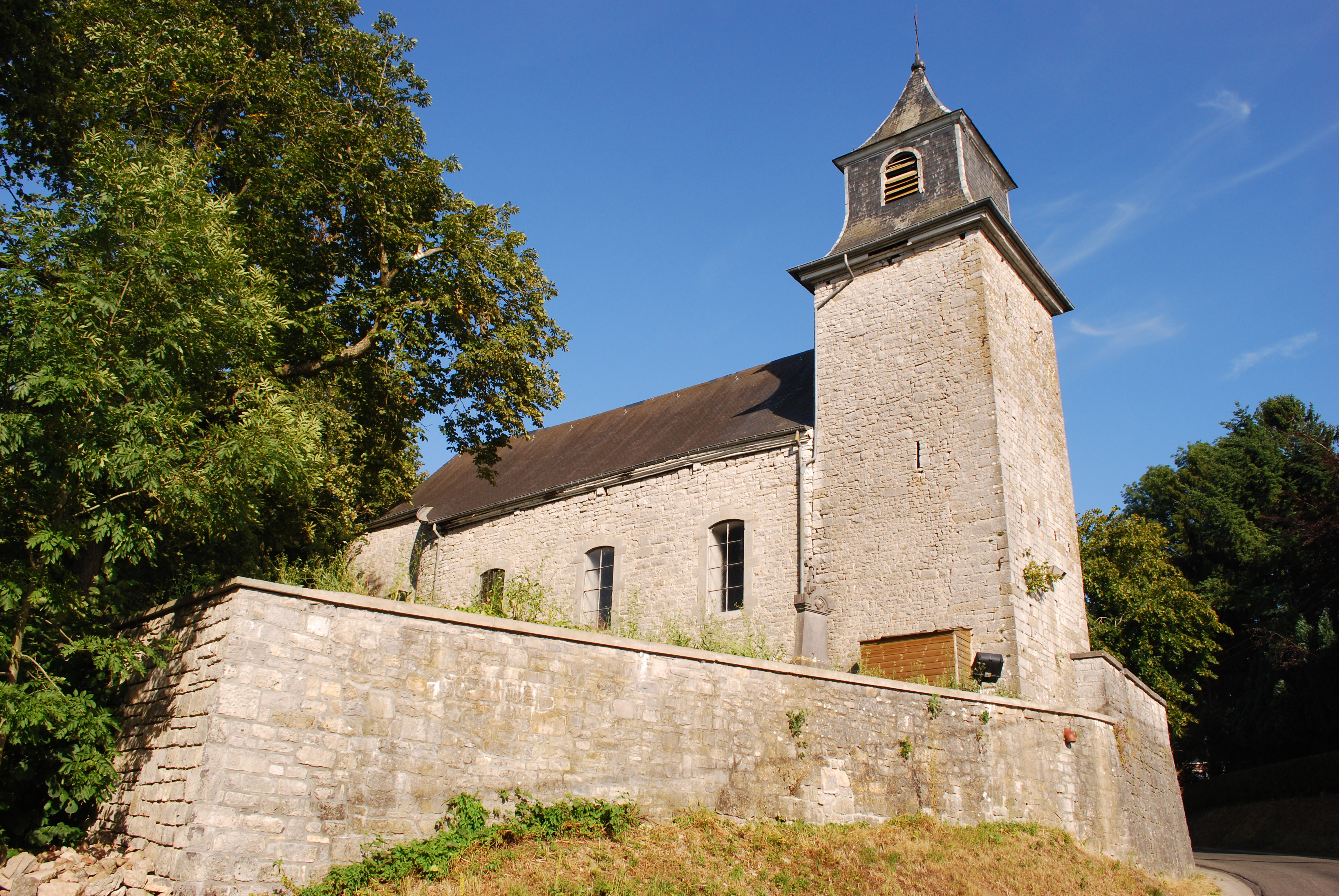 L'église Saint-Georges, à Grandhan (Durbuy).